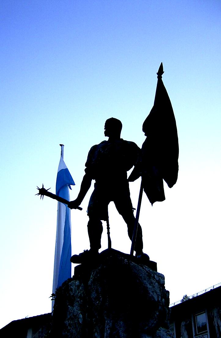 Silhouette des Schmieds von Kochel, Denkmal am Marktplatz in Kochel am See